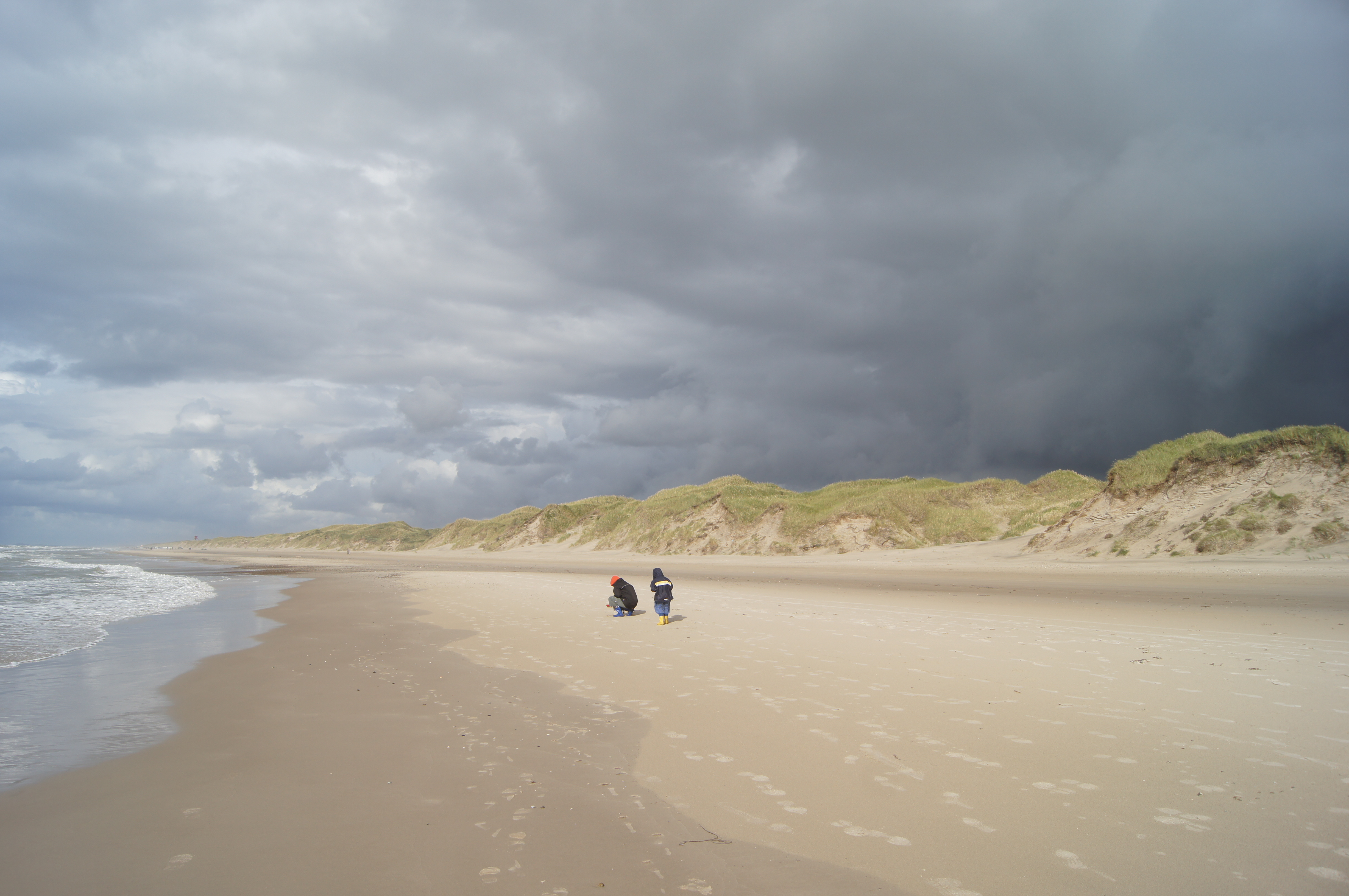 Am Strand der Jammerbucht bei Blokhus